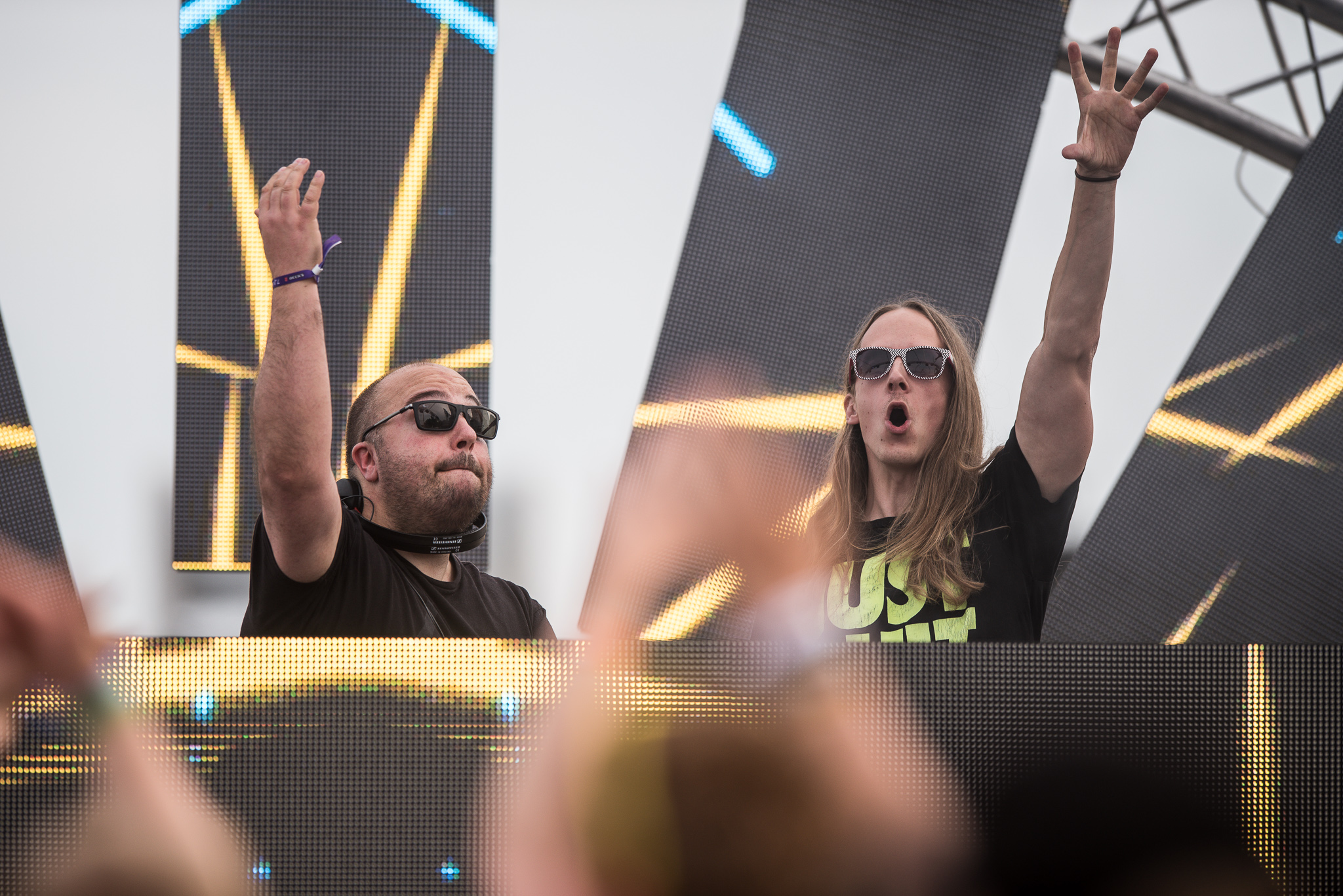 3rd Stage,Festival,Konzert,Livekonzert,Livemusik,Musik,Open Beatz 2016,Pegboard Nerds